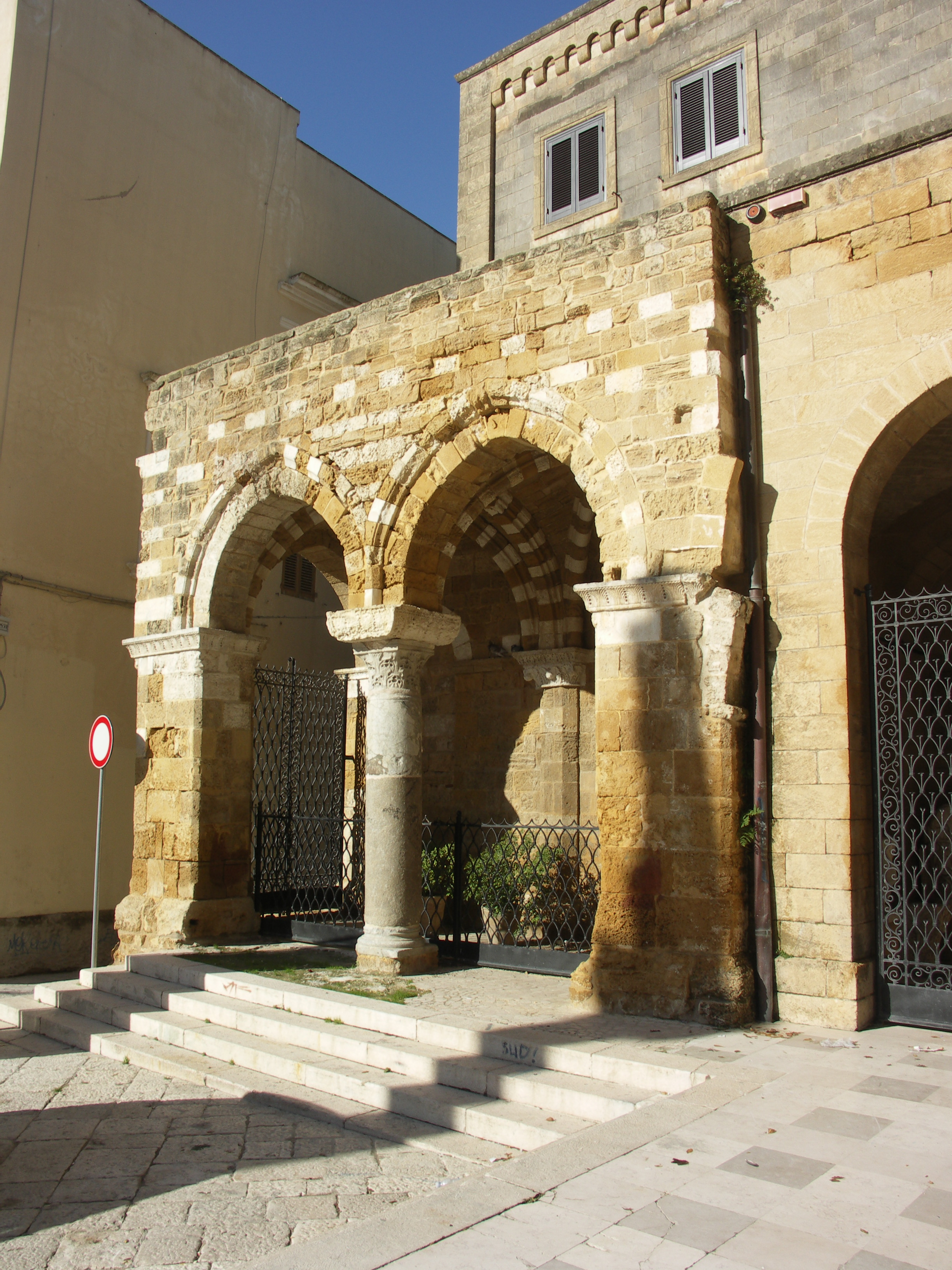 Loggia in piazza Duomo a Brindisi, cosiddetto portico dei Templari